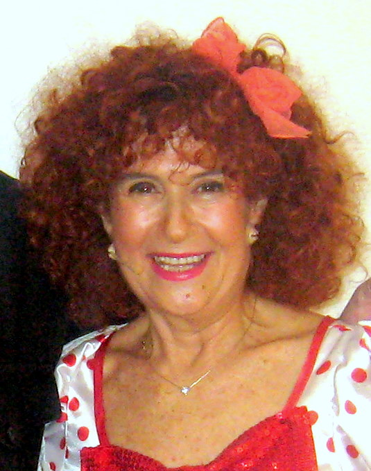 ציפי שביט, במסגרת הופעה בפסטיבל שירי הילדים 2009.